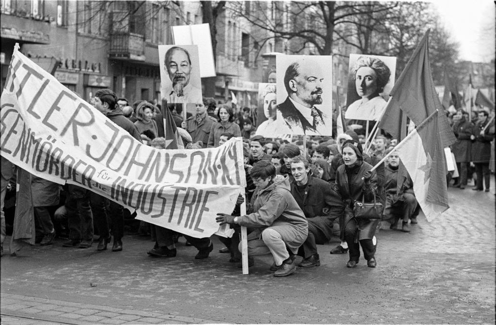 2001_03_0275.0008 Ludwig Binder: Studentenrevolte 1967/68, West-Berlin; veröffentlicht vom Haus der Geschichte